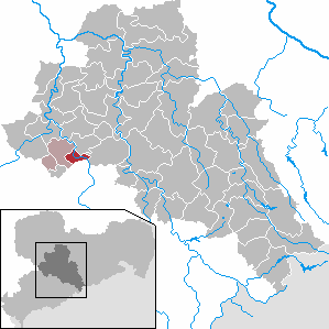 Taura in Saxony - district Mittelsachsen